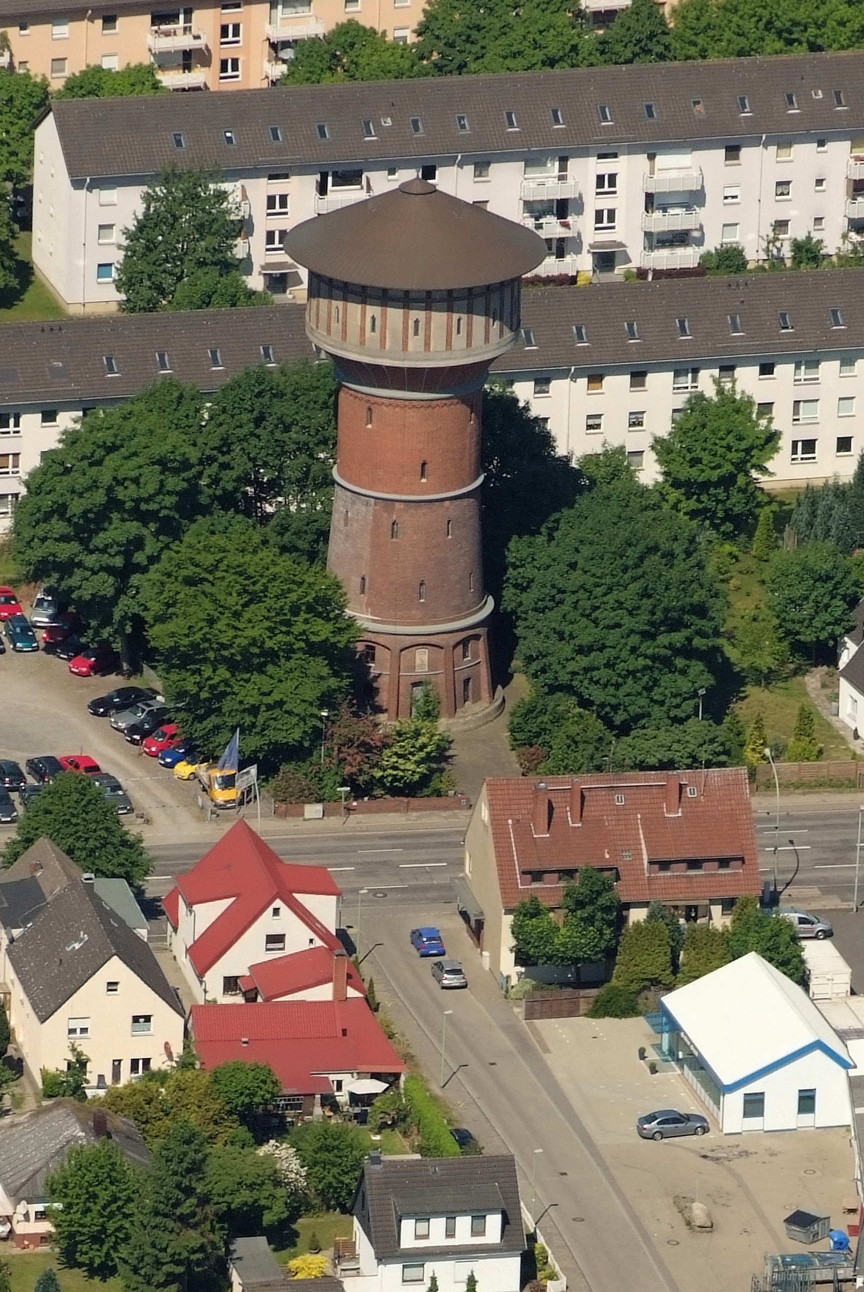 Wasserturm in Lehe (Bremerhaven), Langener Landstraße Fotoflug vom Flugplatz Nordholz-Spieka über Cuxhaven und Wilhelmshaven